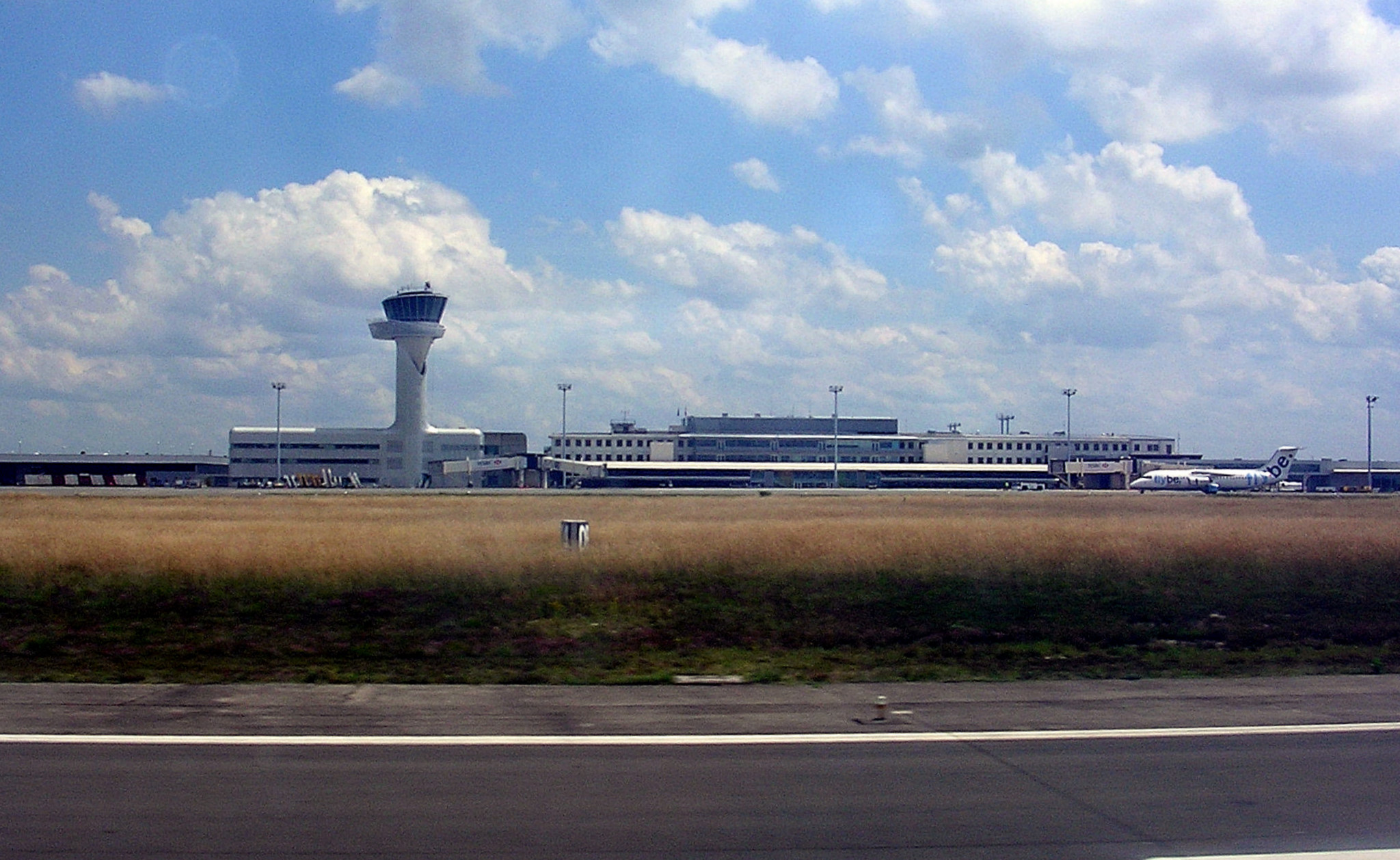 Aéroport de Bordeaux - Mérignac (prise d'un avion au moment du décollage)